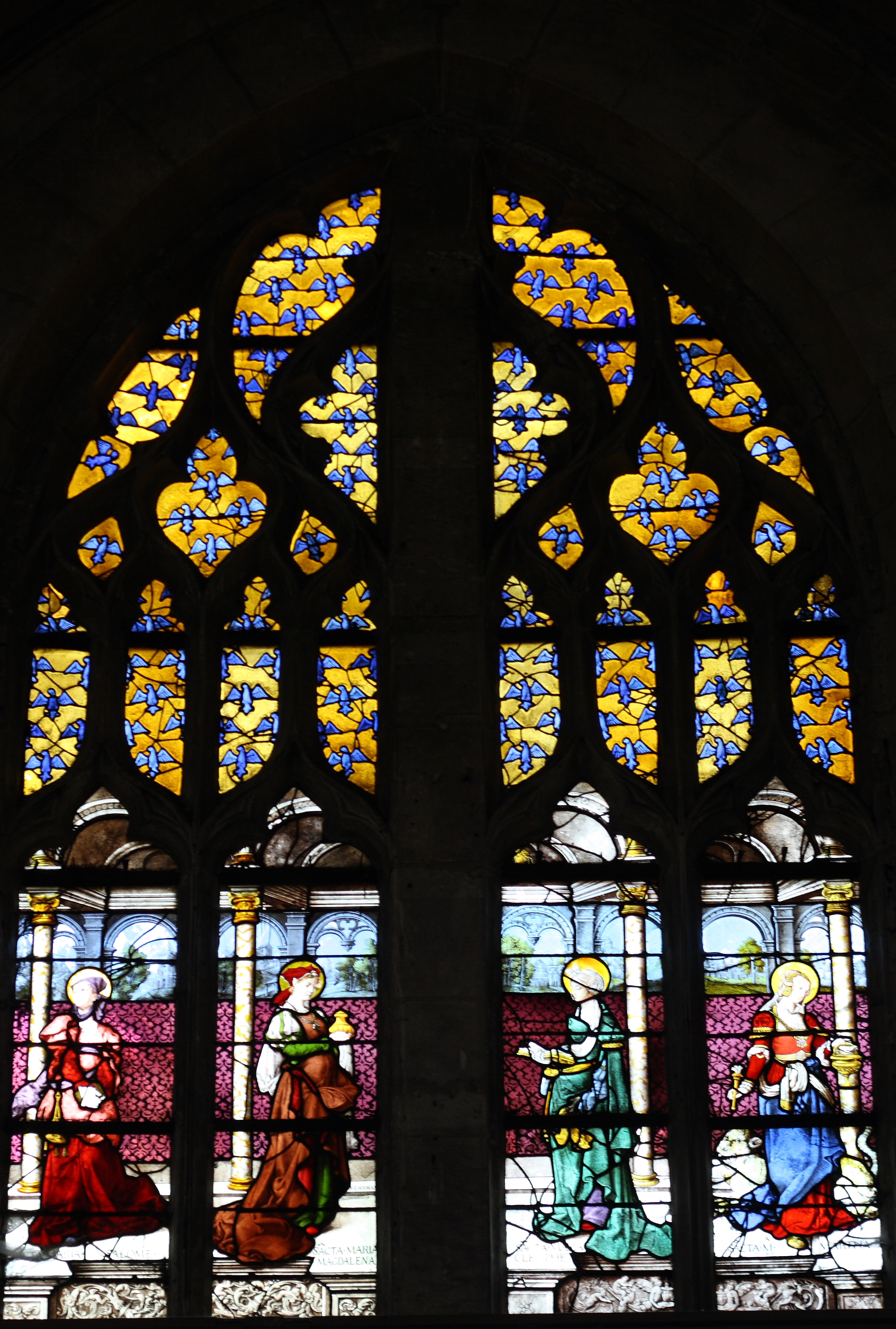 Bleiglasfensters Nr. 11 in der katholischen Pfarrkirche Saint-Martin (Collégiale Saint-Martin) in Montmorency, Darstellung: Salome (19. Jahrhundert), Maria Magdalena (19. Jahrhundert), Maria Kleophae (1525) und Martha (15125) (siehe: Dominique Foussard, Charles Huet, Mathieu Lours: Églises du Val-d'Oise. Pays de France, Vallée de Montmorency, Société d'Histoire et d'Archéologie de Gonesse et du Pays de France, 2. Auflage, Gonesse 2011, ISBN 9782953155426)